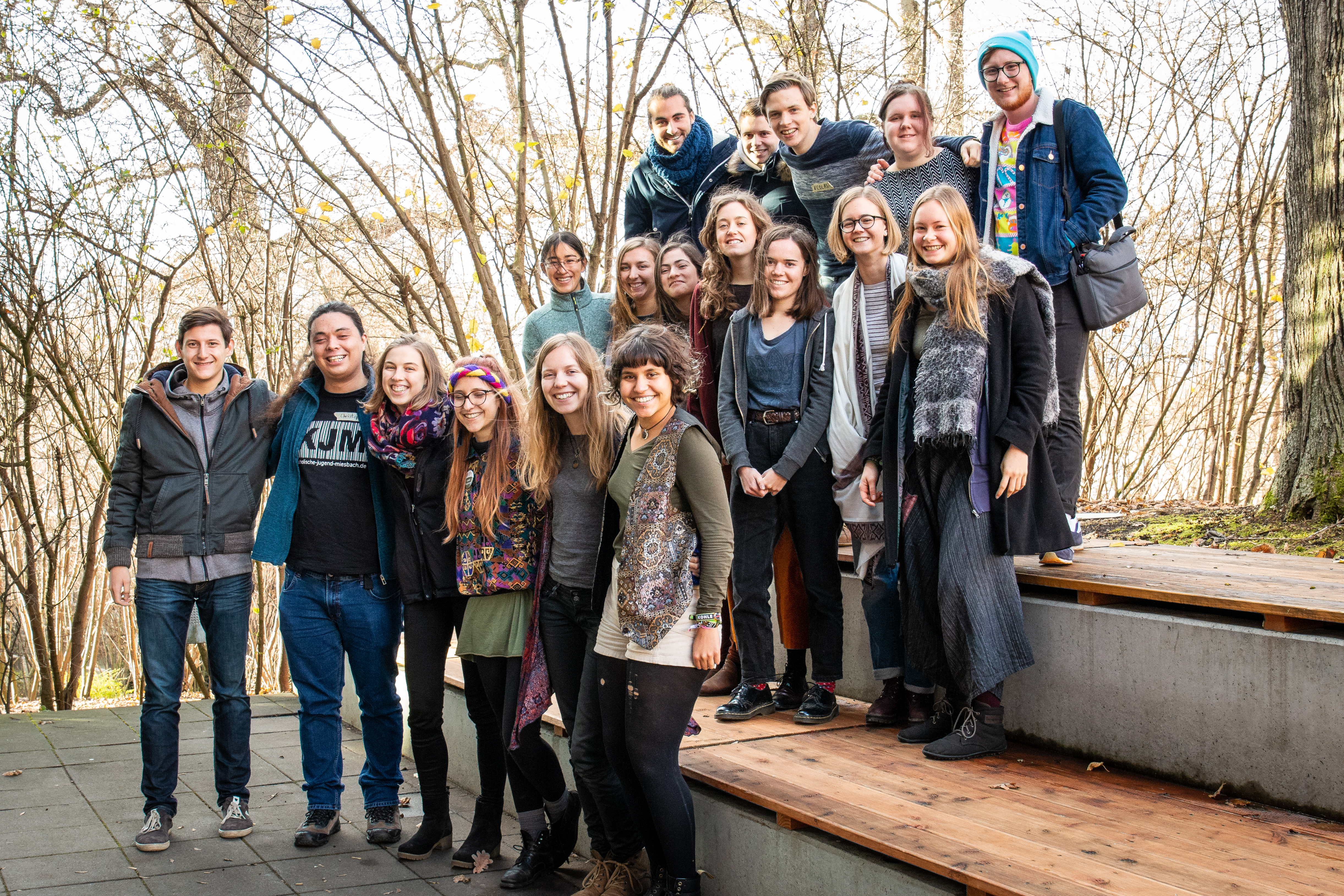 Gruppenfoto des youpaN